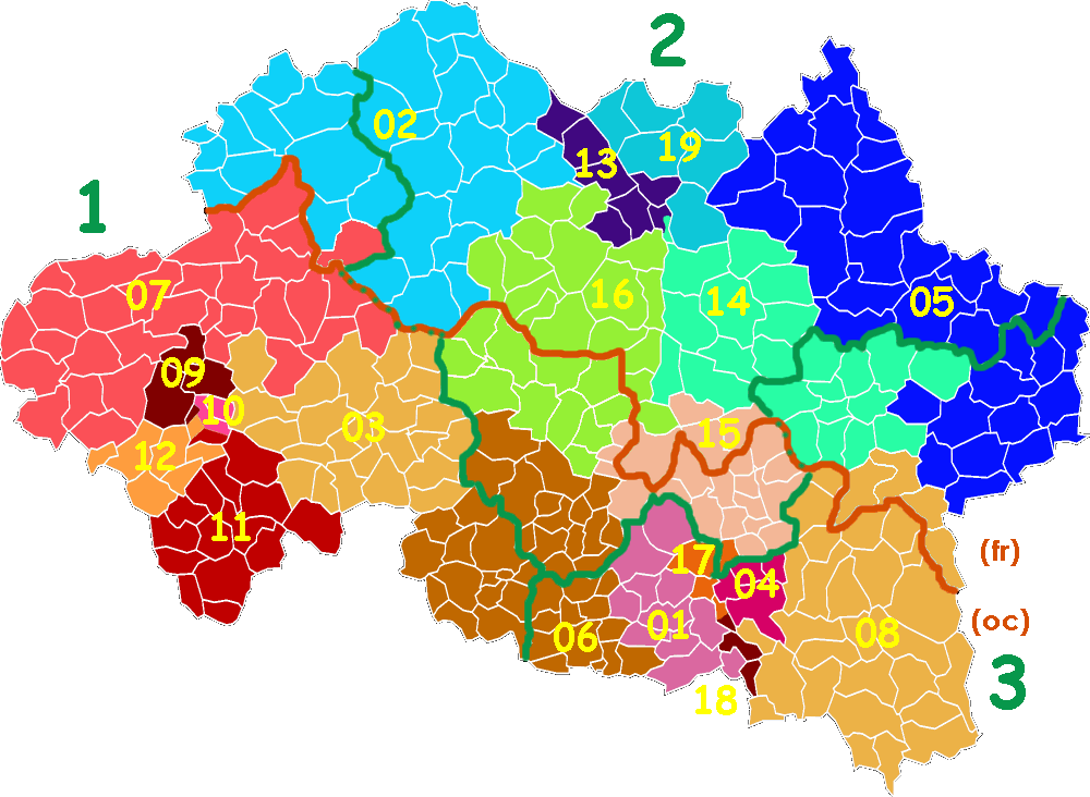 Carta del departament d'Alèir amb las circonscripcions legislativas, los cantons e las comunas en 2015